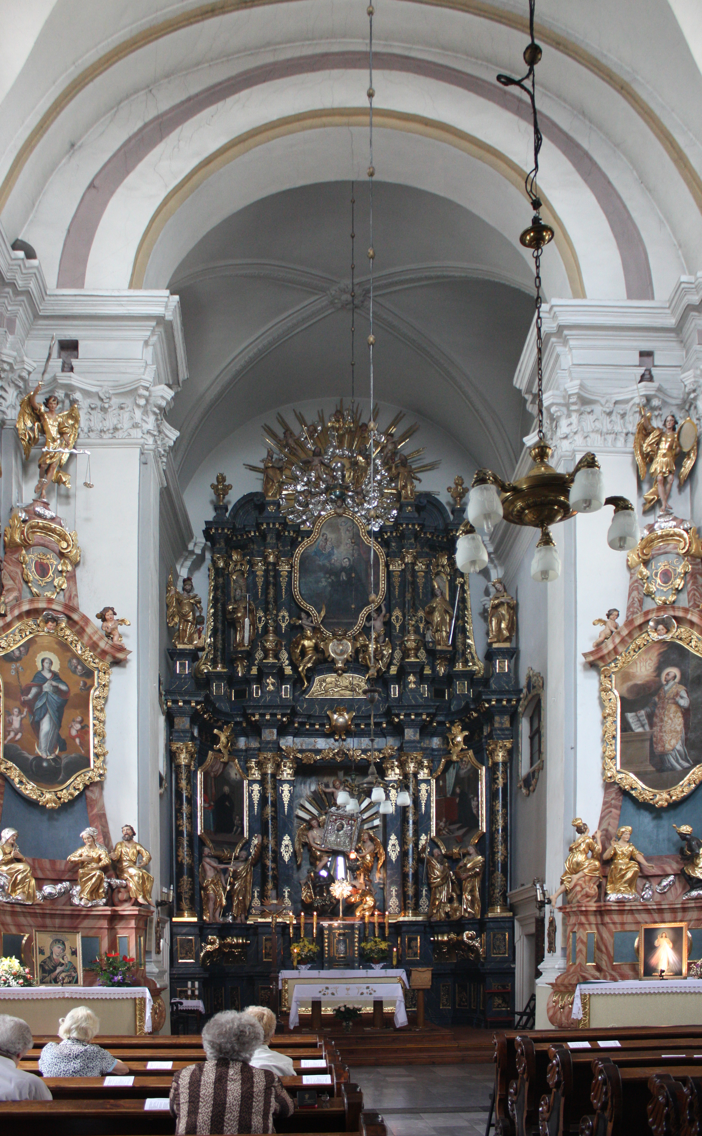 Grudziądz, kościół klasztorny jezuitów p.w. św. Franciszka Ksawerego, 1648, 1715 (ołtarz główny)